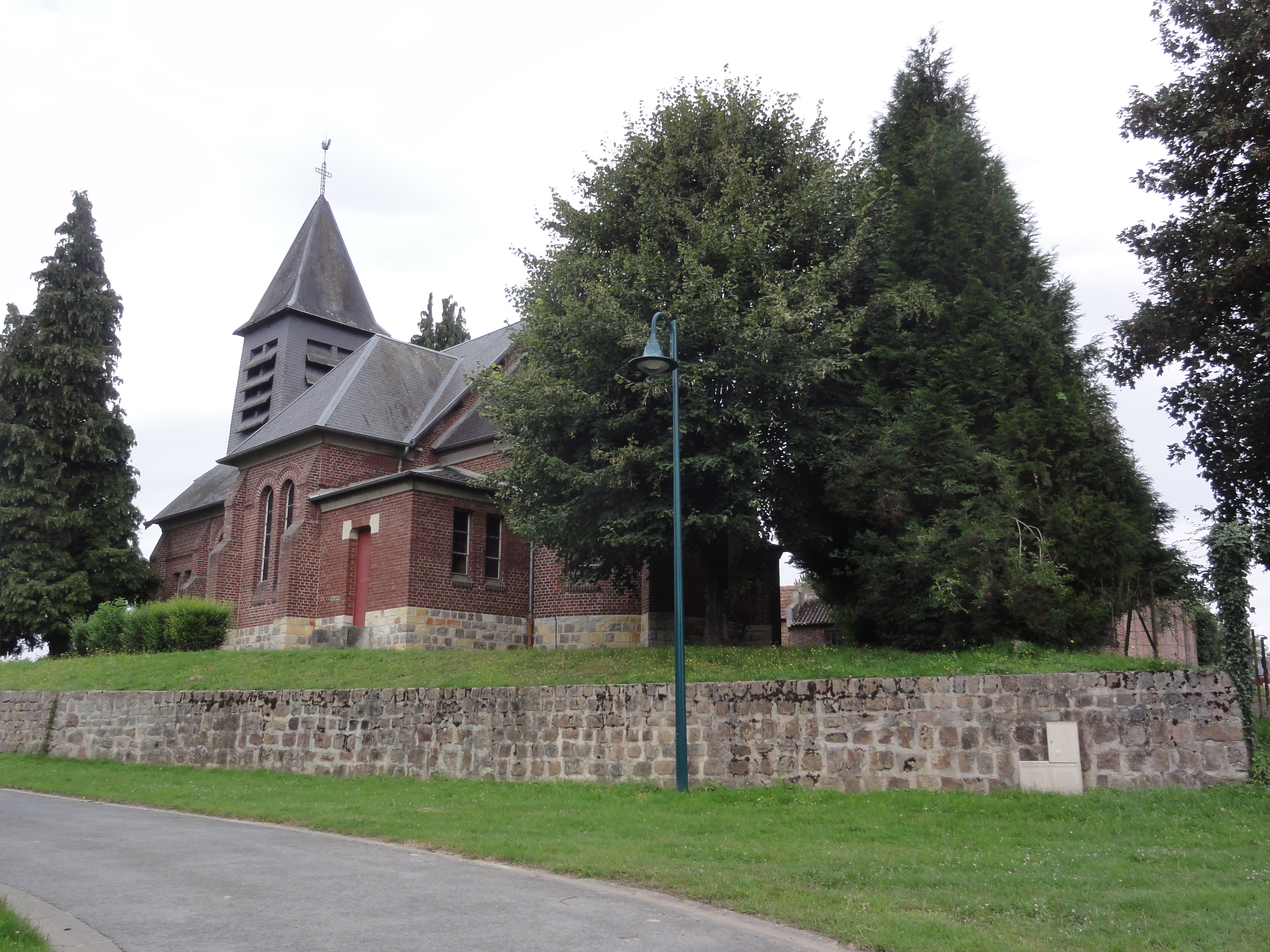 Happencourt (Aisne) église Saint Martin avec place